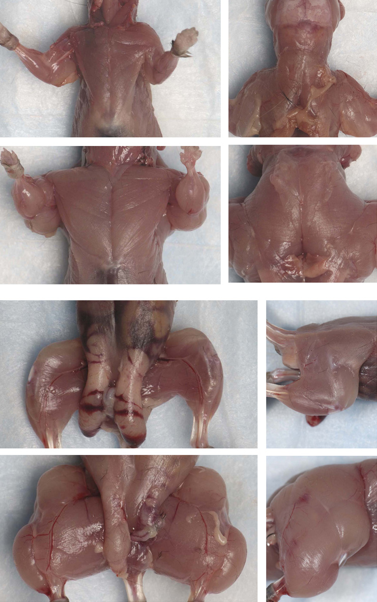 Sektion einer Maus (Wildtyp) in der 1. und 3. Reihe. Im Vergleich dazu eine transgene Maus -/- Mstn F66 (2. und 4. Reihe). Bei der transgenen Maus wurde das Mstn-Gen abgeschaltet. Die Muskelmasse der transgenen Maus ist um den Faktor 4 höher, als bei dem Wildtyp.